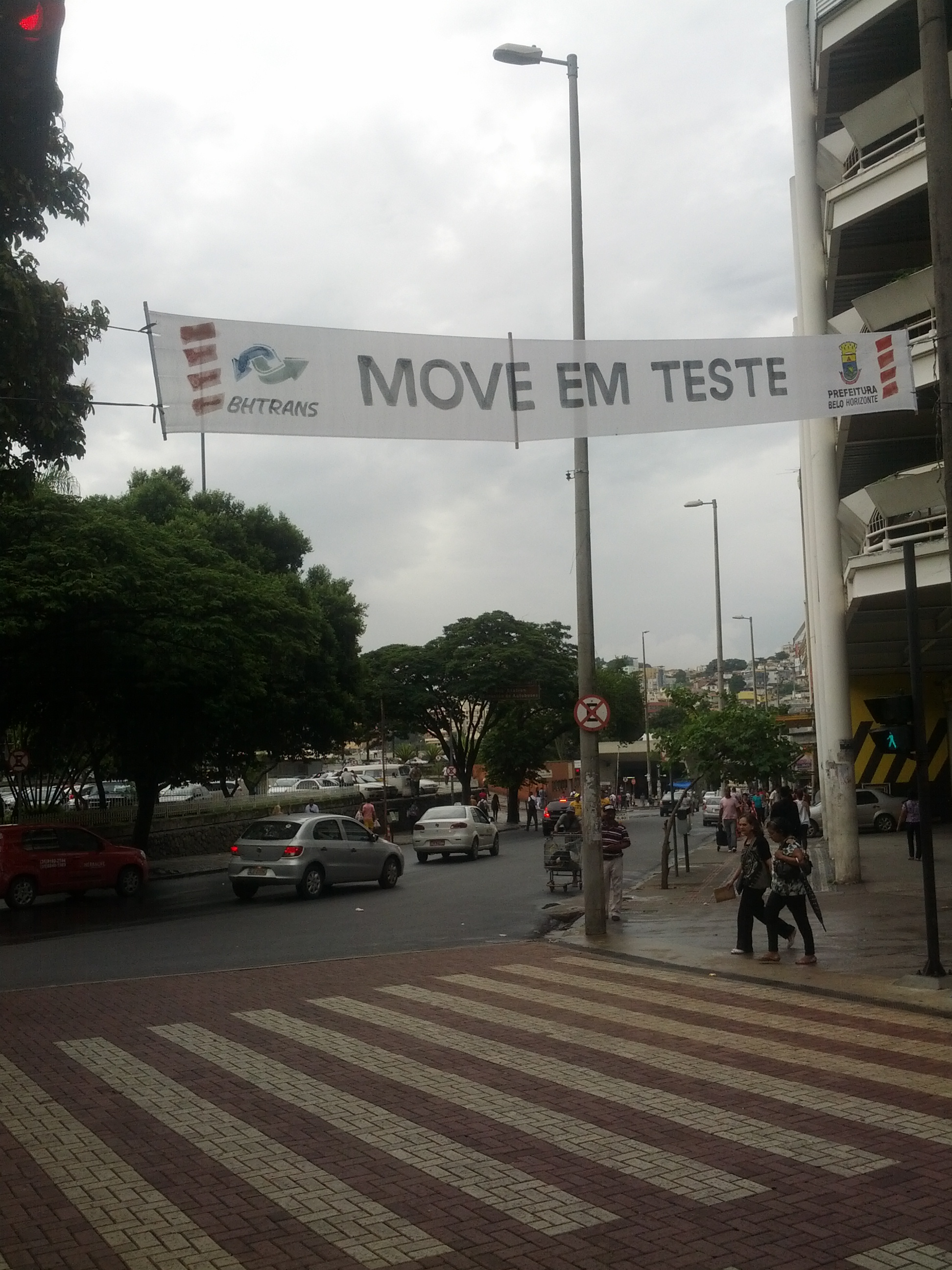 Cartaz indicando Move em Teste, em Belo Horizonte.